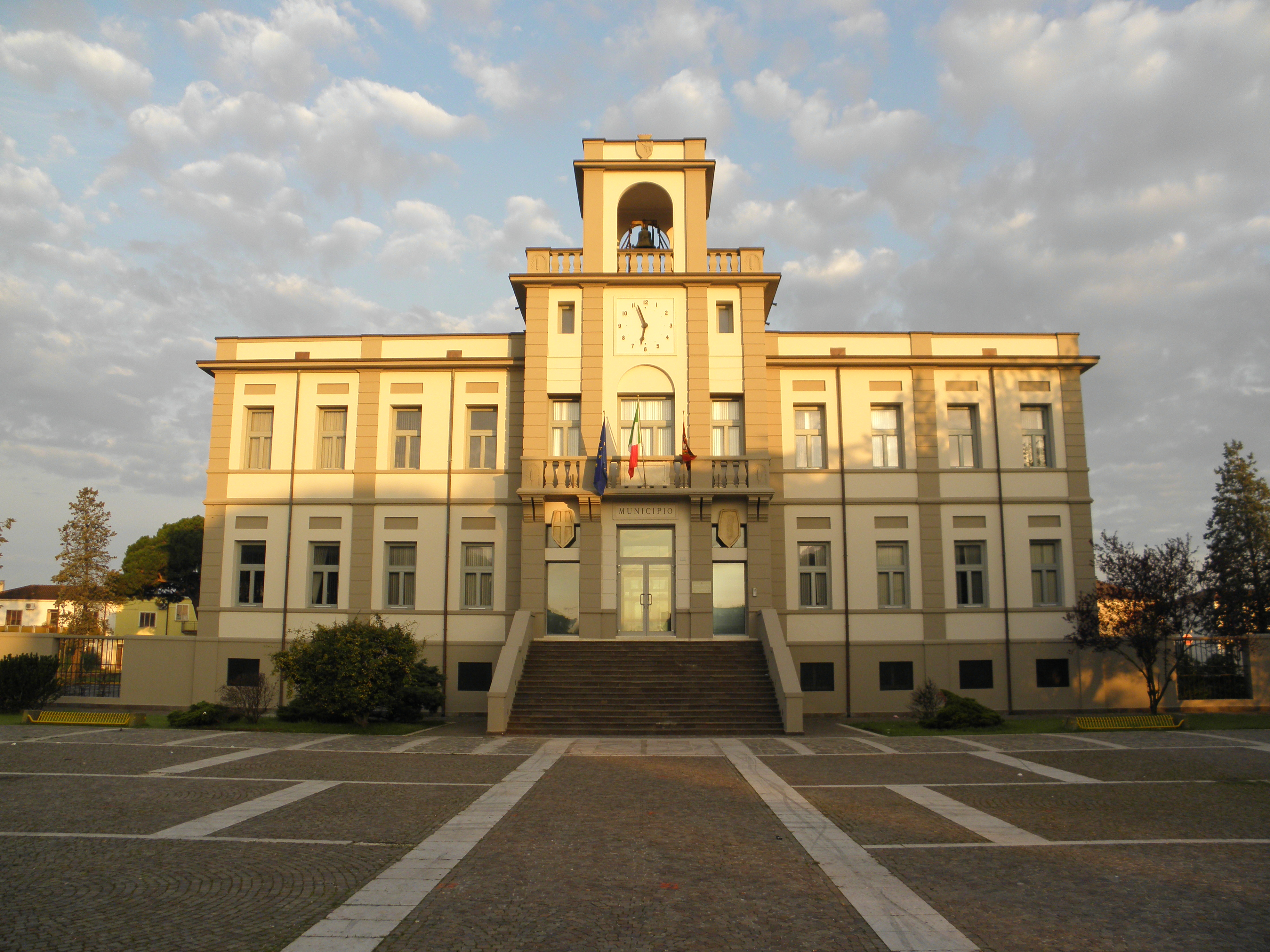 Porto Viro, Palazzo Municipale, sede dell'attuale comune di Porto Viro e già del comune soppresso di Contarina..